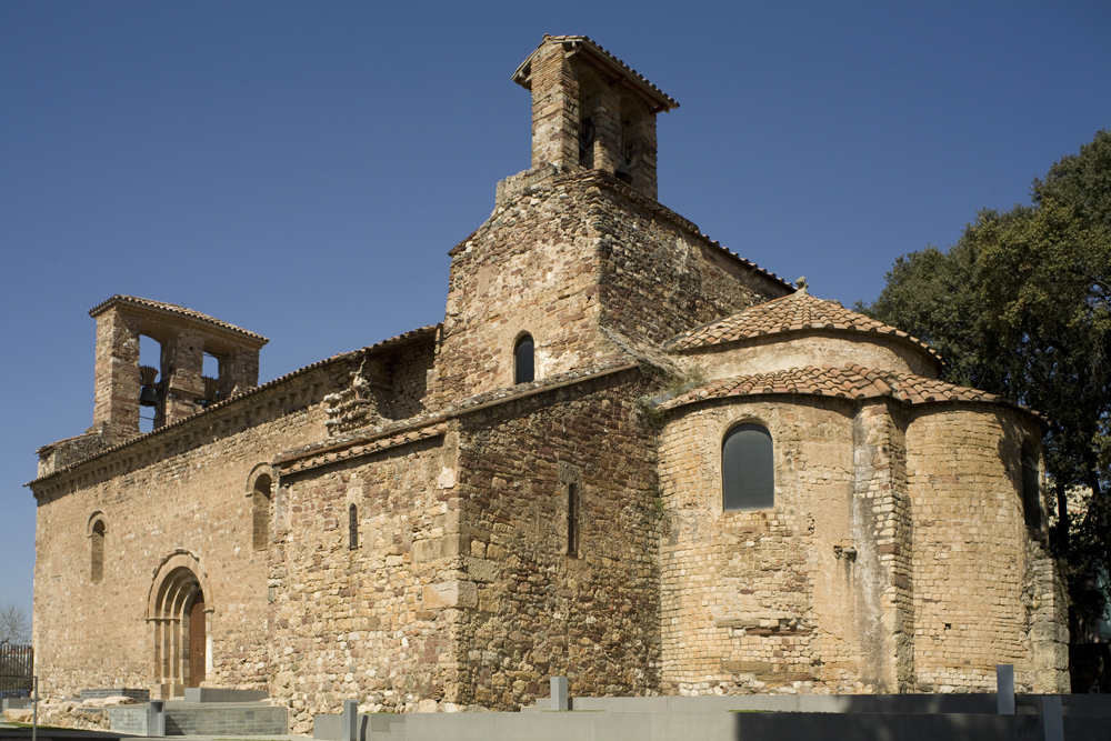 Cultural Heritage Spain